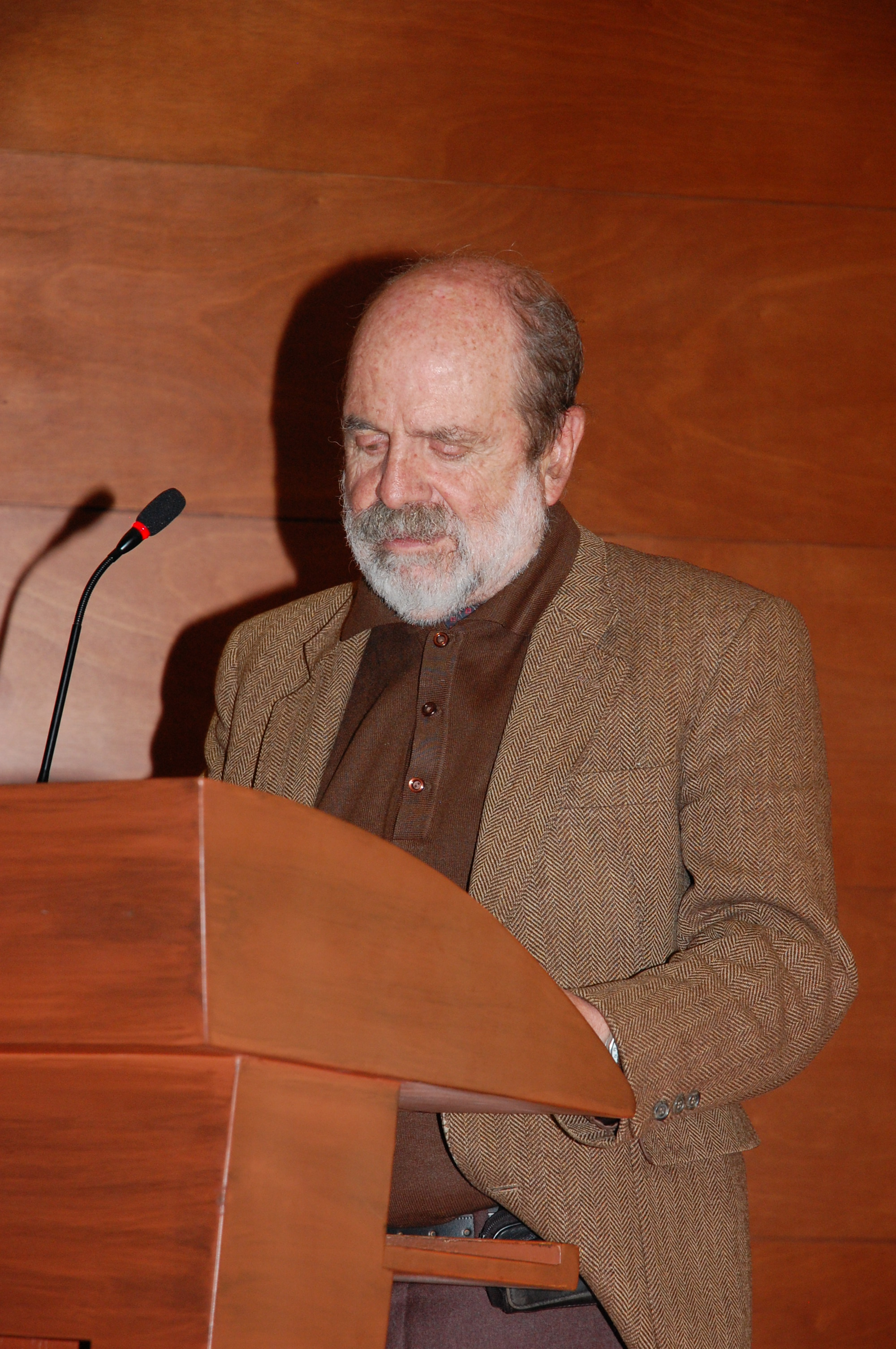 Germán Borda compositor, escritor, crítico y profesor colombiano.